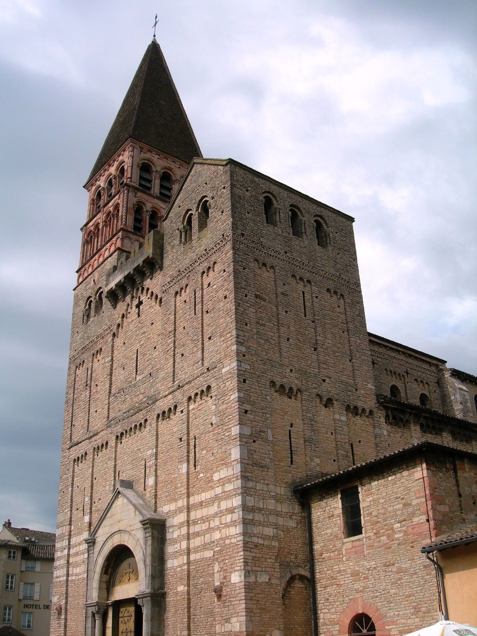 Tournus, les tours de l´église)